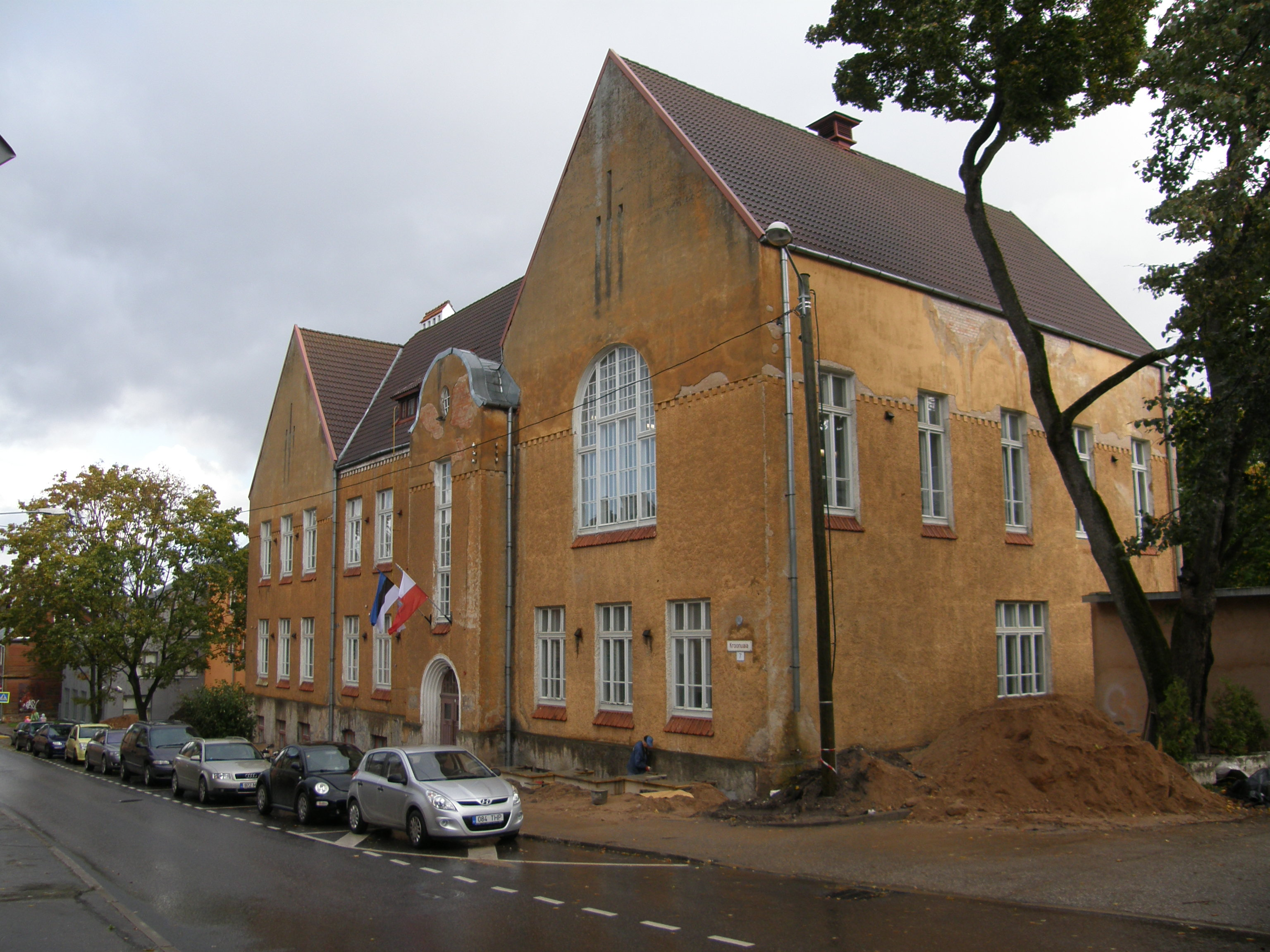 Koolihoone Tartus Kroonuaia 7